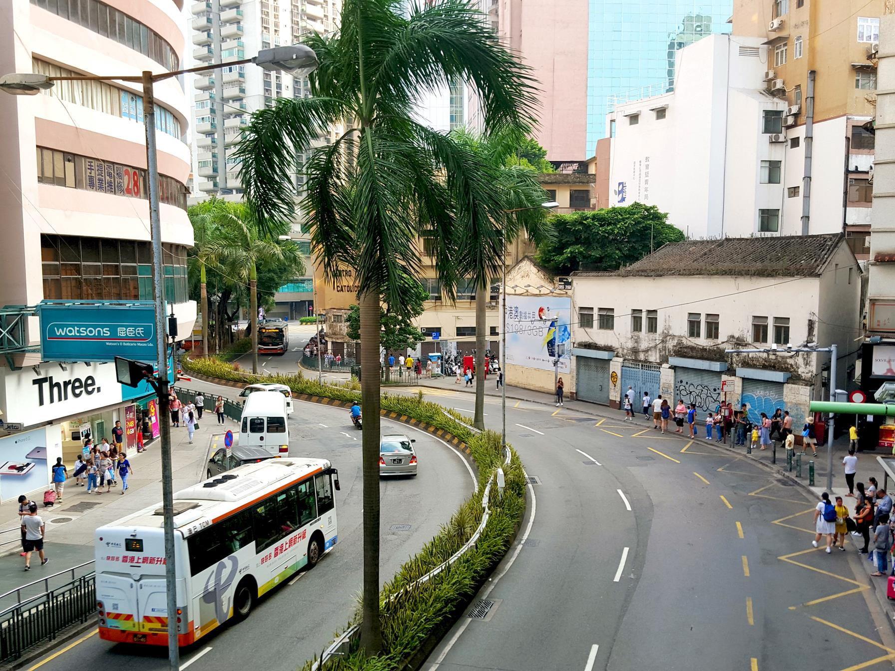 Rua do Campo